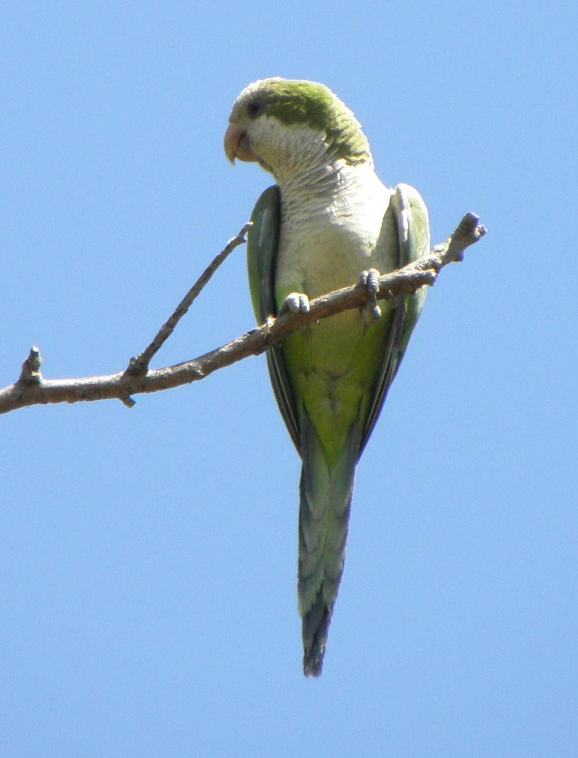 Myiopsitta monachus calita en las afueras de la ciudad de Córdoba, provincia de Córdoba, en el centro de la Argentina.